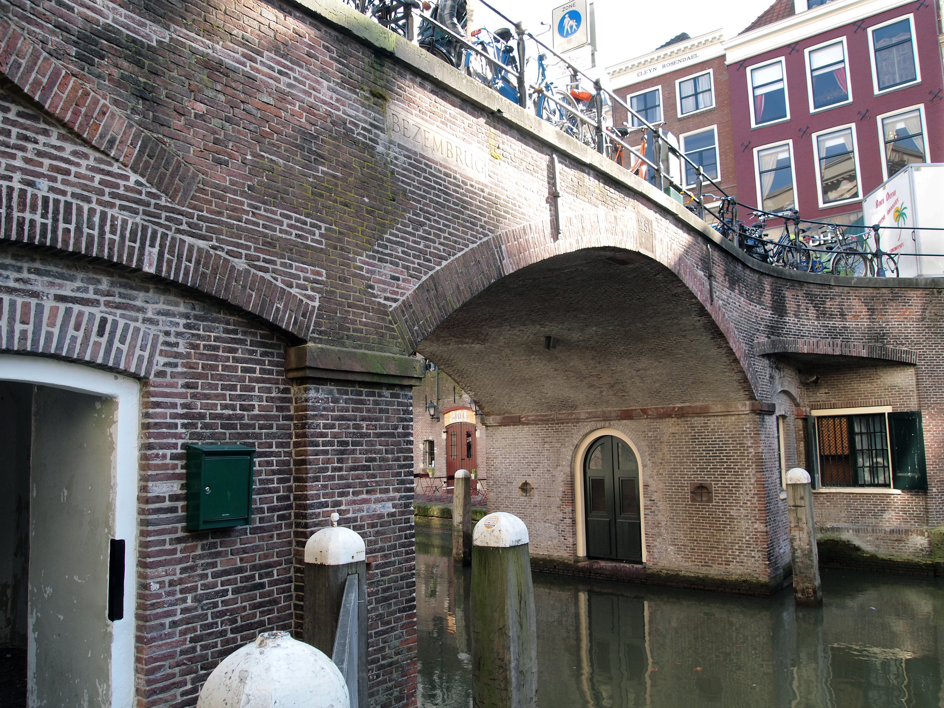 Bezemburg over de Oudegracht in Utrecht.